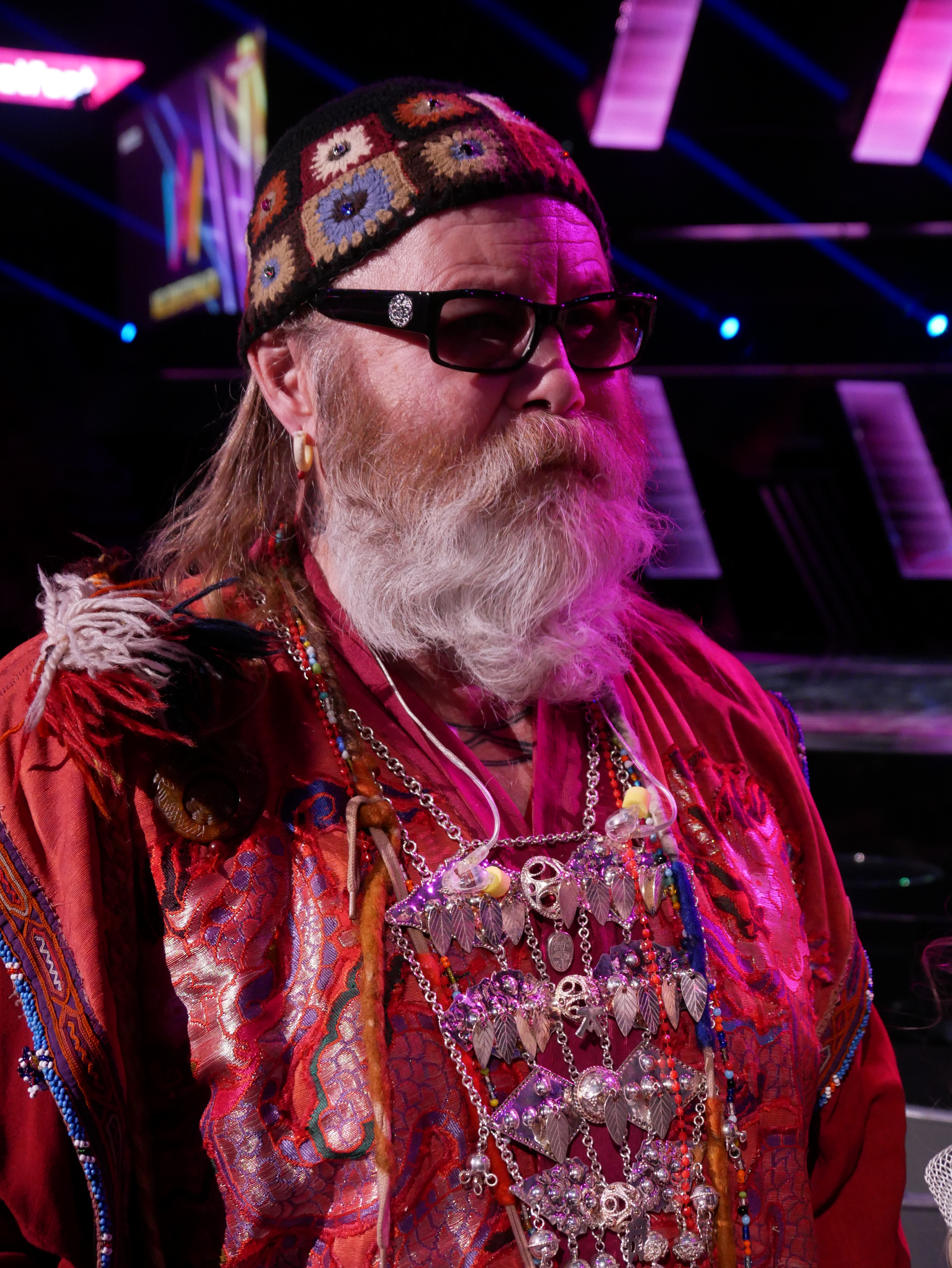 Melodifestivalen 2017, deltävling 2